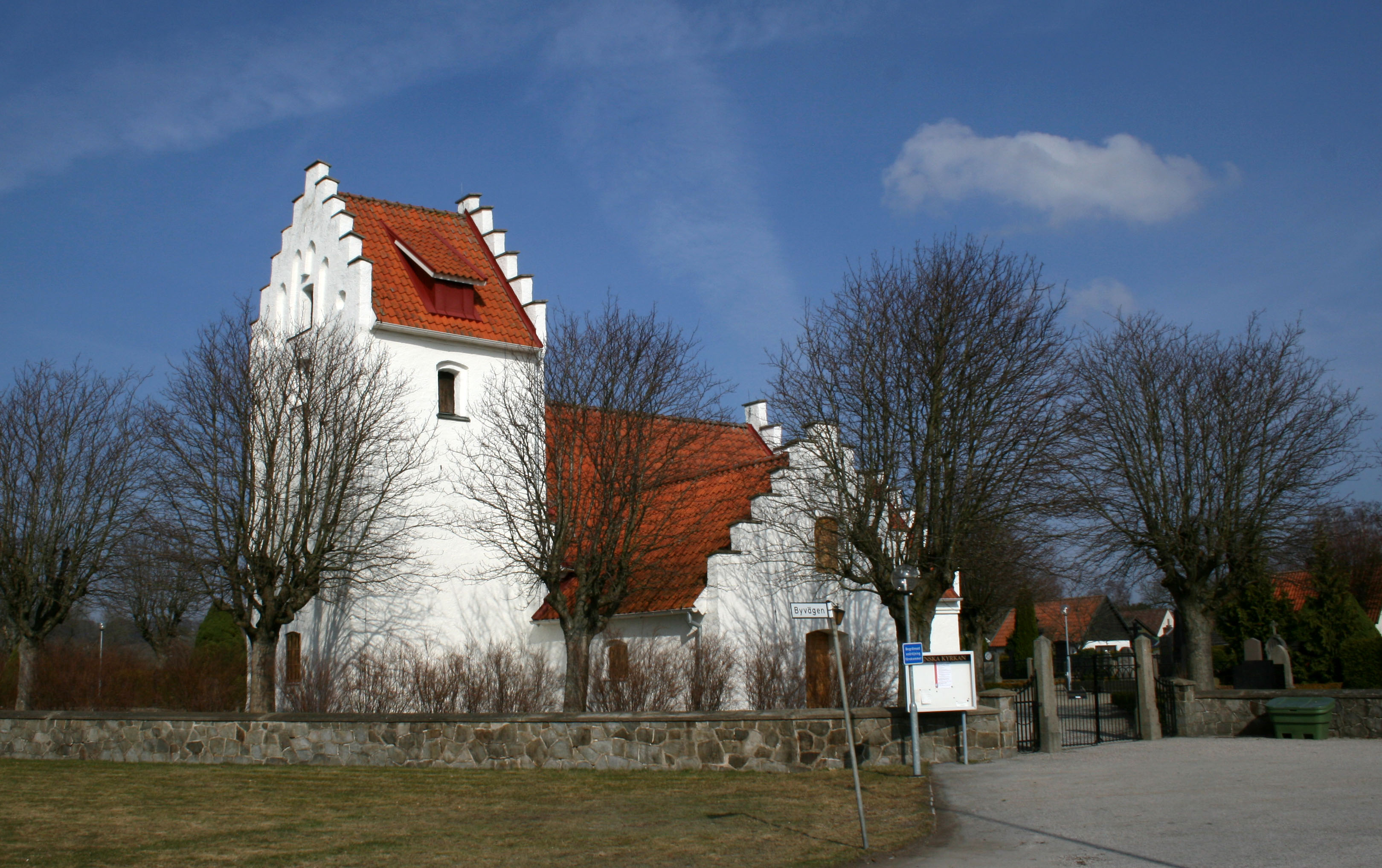 Revinge kyrka